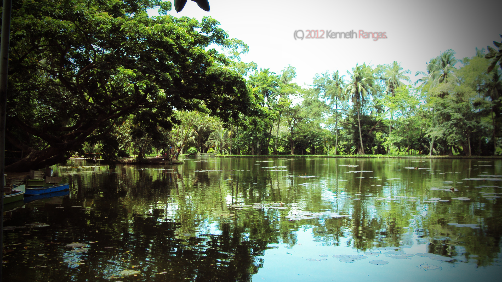 Amandari Cove lake